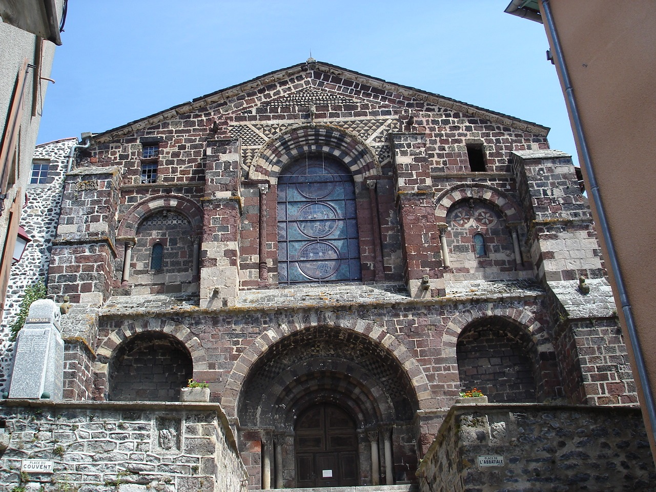 Le Monastier-sur-Gazeille, comm. de la Haute-Loire, France (région Auvergne). Abbatiale St.-Chaffre.